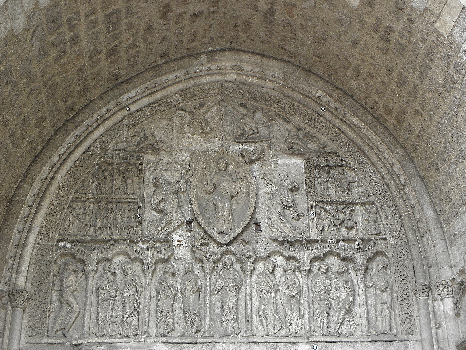 Tympan du portail roman de la cathédrale Saint-Étienne de Cahors (46). .